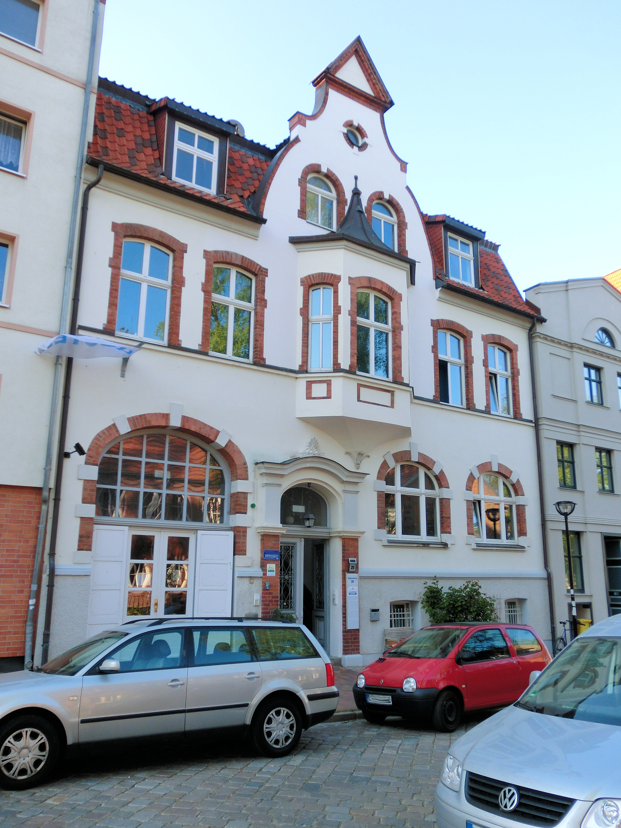 Vorderhaus des früheren Tattersall (Baudenkmal, Rostock, Beginenberg 25-26)